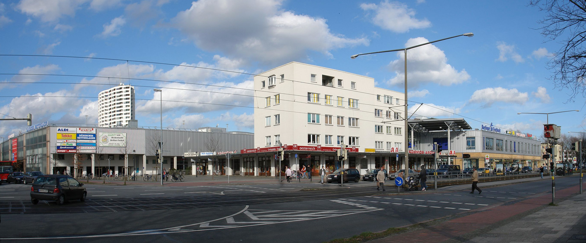 Berliner Freiheit in Bremen Vahr. Panorama erstellt mit AutoStitch